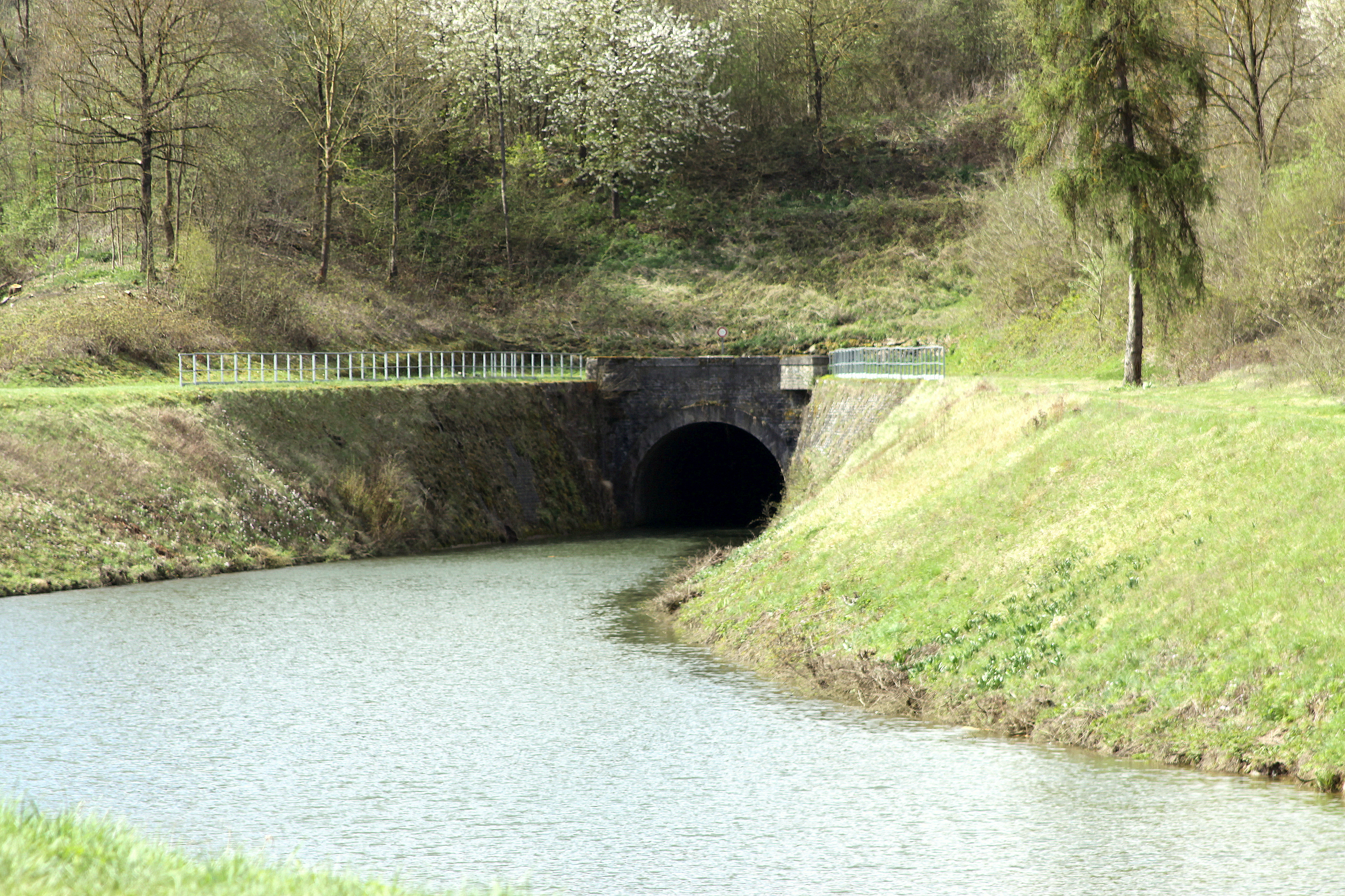 Den Tunnel um Meusekanal zu Ham-sur-Meuse.